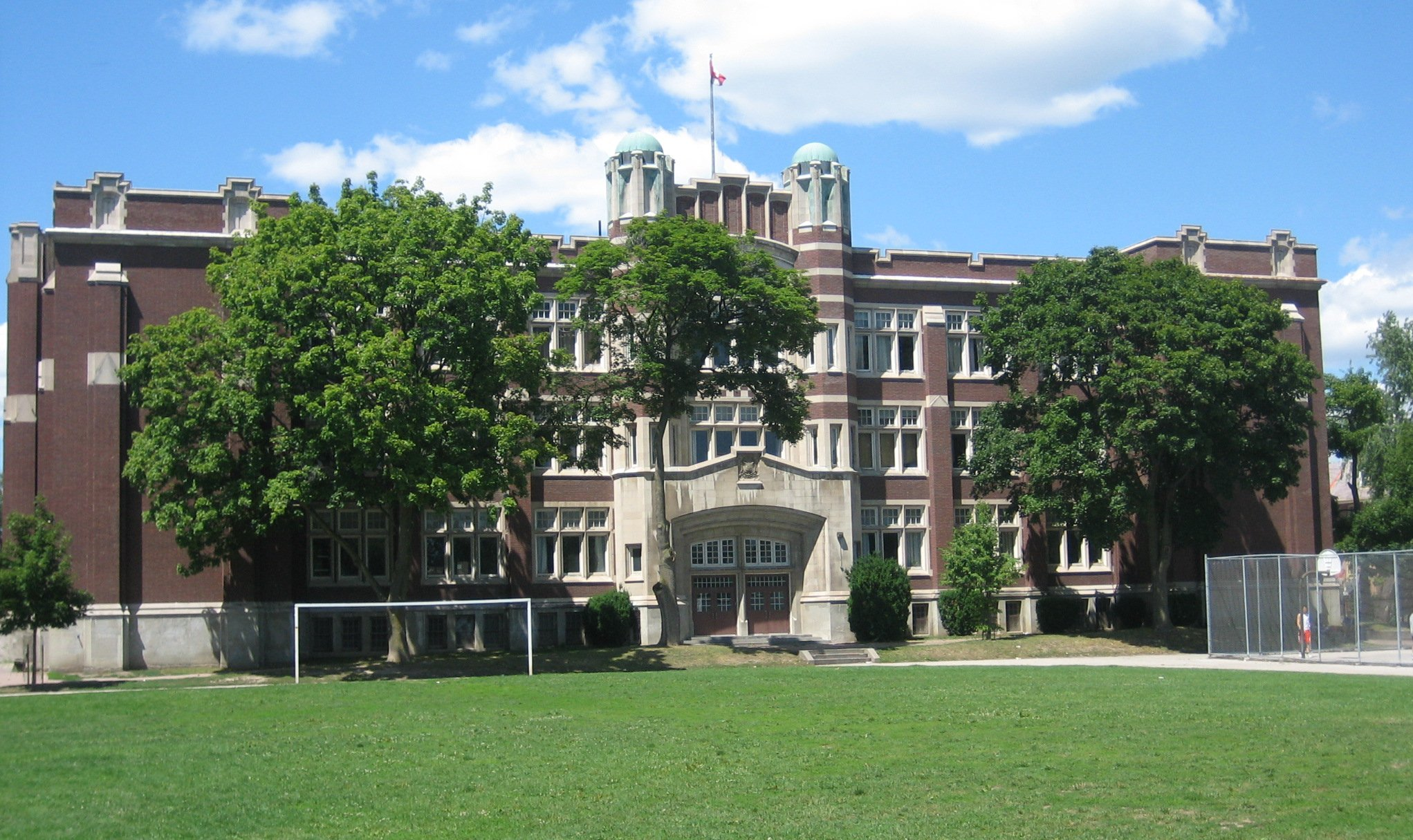 Central Commerce Collegiate